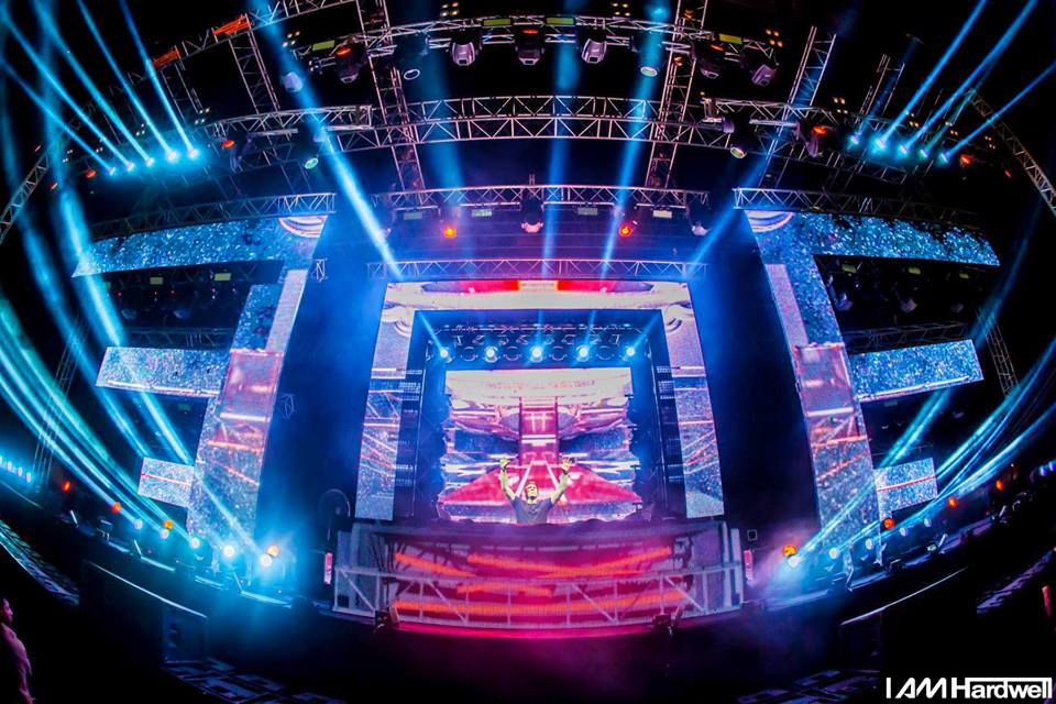 Hardwell2014 Vietnam